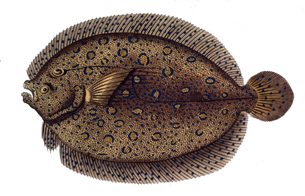 Bothus lunatus